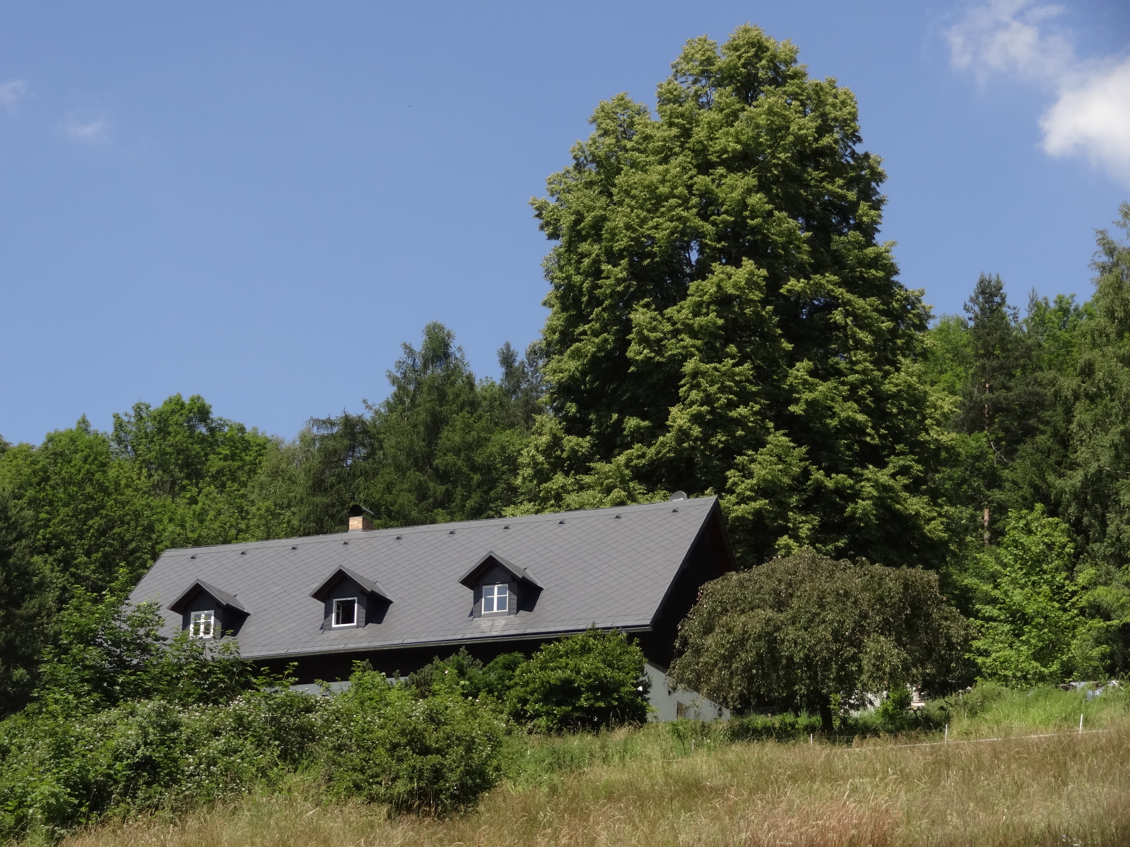 Památná lípa malolistá u domu čp. 158 v osadě Novina (součást Kryštofova Údolí)